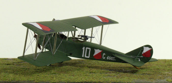 Model samolotu Rumpler C.I pomalowanego w barwy z pl:1918 roku w lotnictwie polskim. Na skrzydłach, kadłubie i usterzeniu pionowym namalowane tzw. warszawskie znaki rozpoznawcze w postaci tarcz podzielonych na dwa pola w barwach białej i czerwonej. Tarcze te zastąpiono szachownicami biało-czerwonymi. Autor udostępnił grafika jako public domain Zdjęcie pochodzi ze strony pl